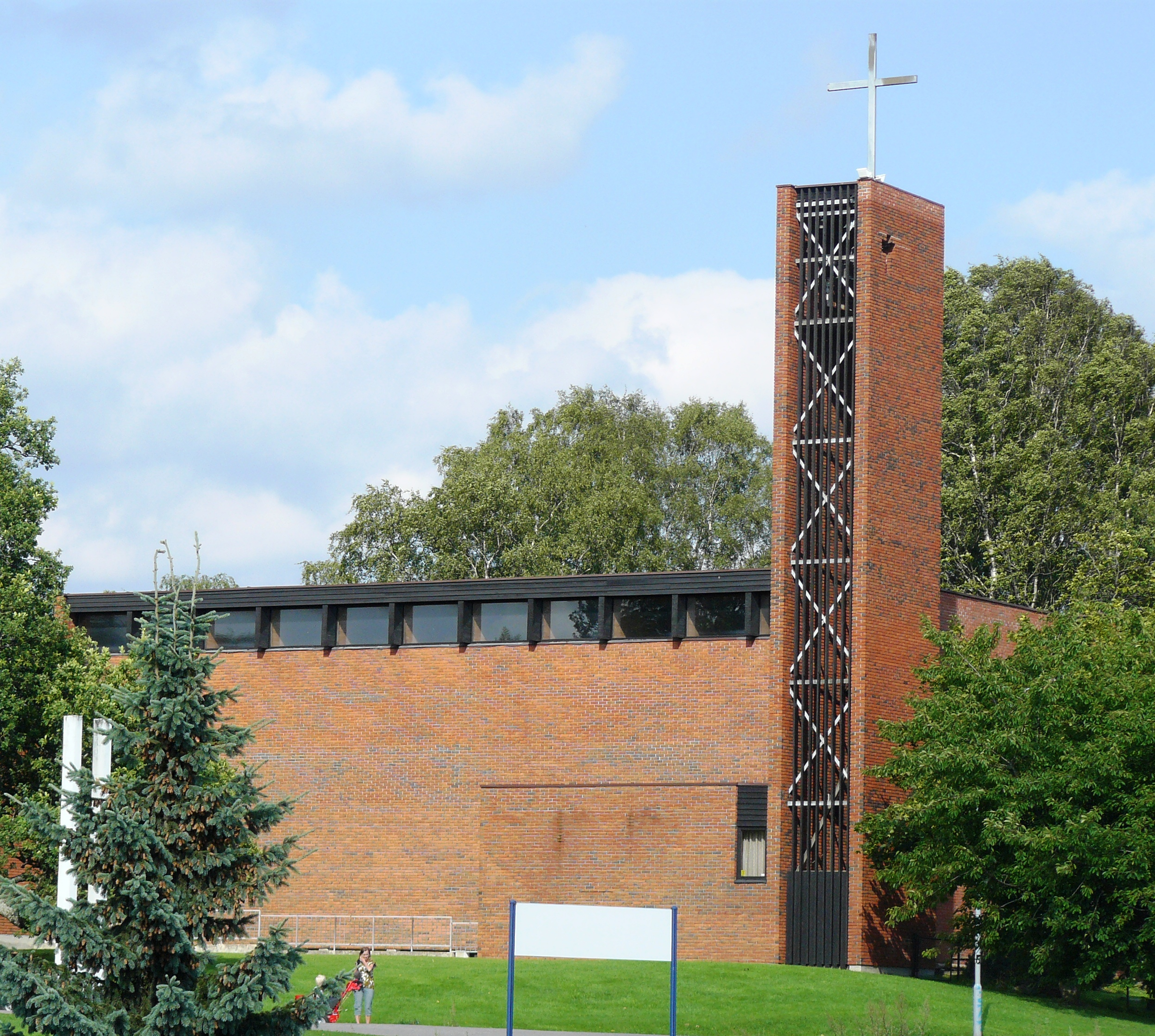 Bredtvedt Church, Oslo